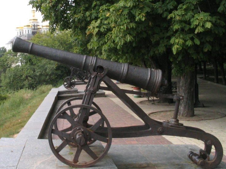 Пушка на лафете конструкции полковника артилерии Андрея Т Венгловского (JĘDRZEJA WĘGLOWSKIEGO). Первый железный лафет русской артиллерии. Город Чернигов, Украина.